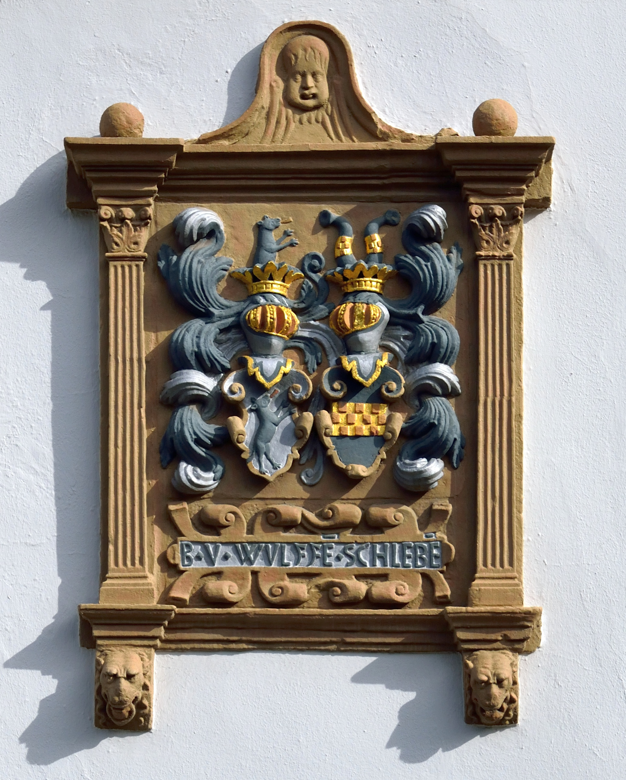 This is the photograph of an architectural monument. It is part of the list of cultural monuments of Lemgo Wappentafel am Wendschen Hof; Allianzwappen von Hermann Wulff und Anna von Schlieben